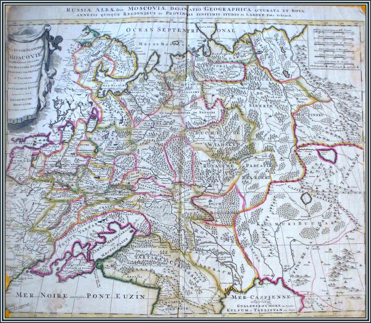 Peter Schenk, Кабинетная карта России (Московии), 1698, (58 x 49,5 cм)